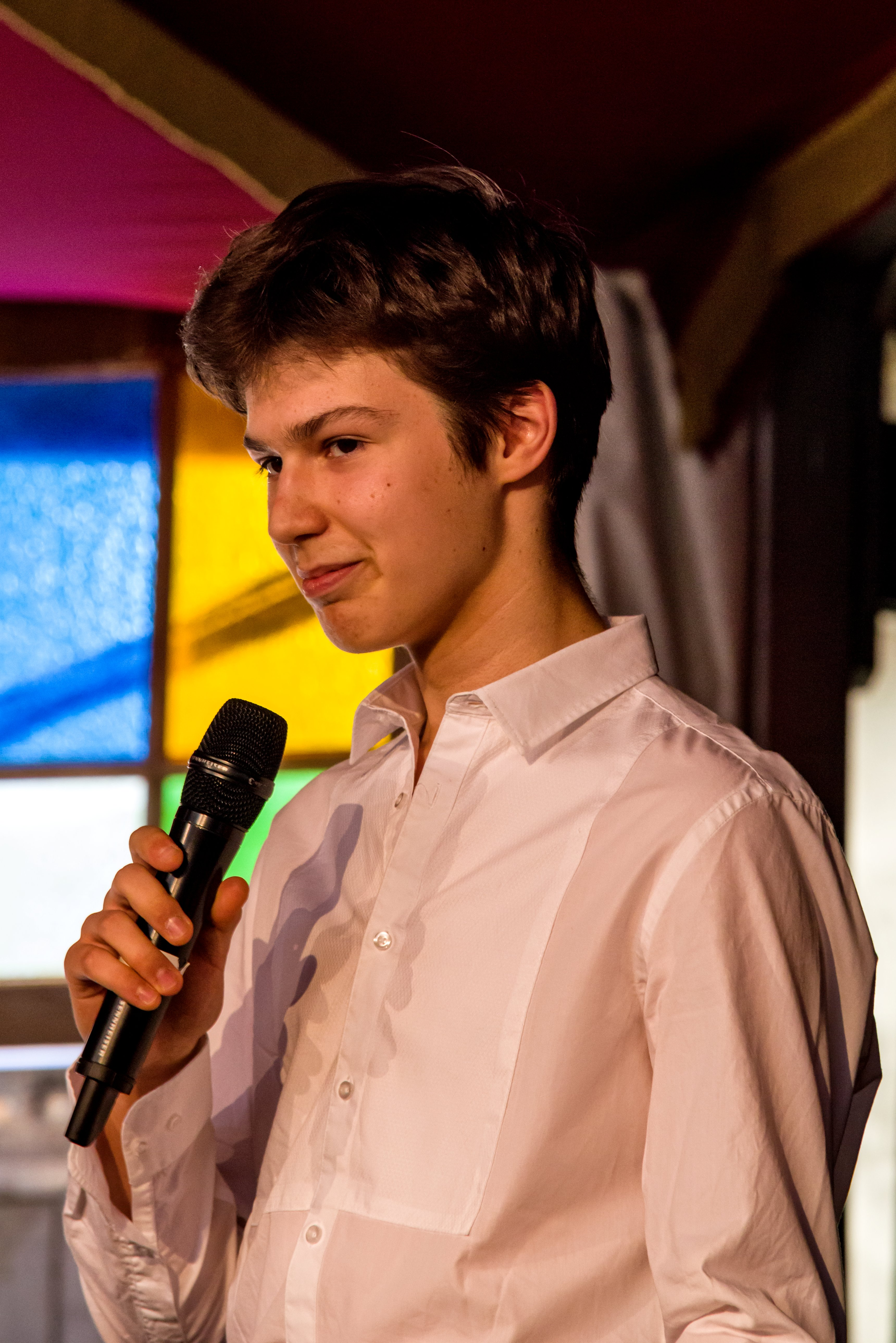 Bilder vom Zelt Musik Festival 2017 in Freiburg im Breisgau Die Klassikmatinee "Von Bach bis Gerschwin und Piazolla"